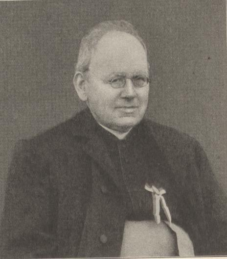 Peter Carl Aloys Kreutzwald (1850-1918) Domkapitular und Generalvikar des Bistums Köln